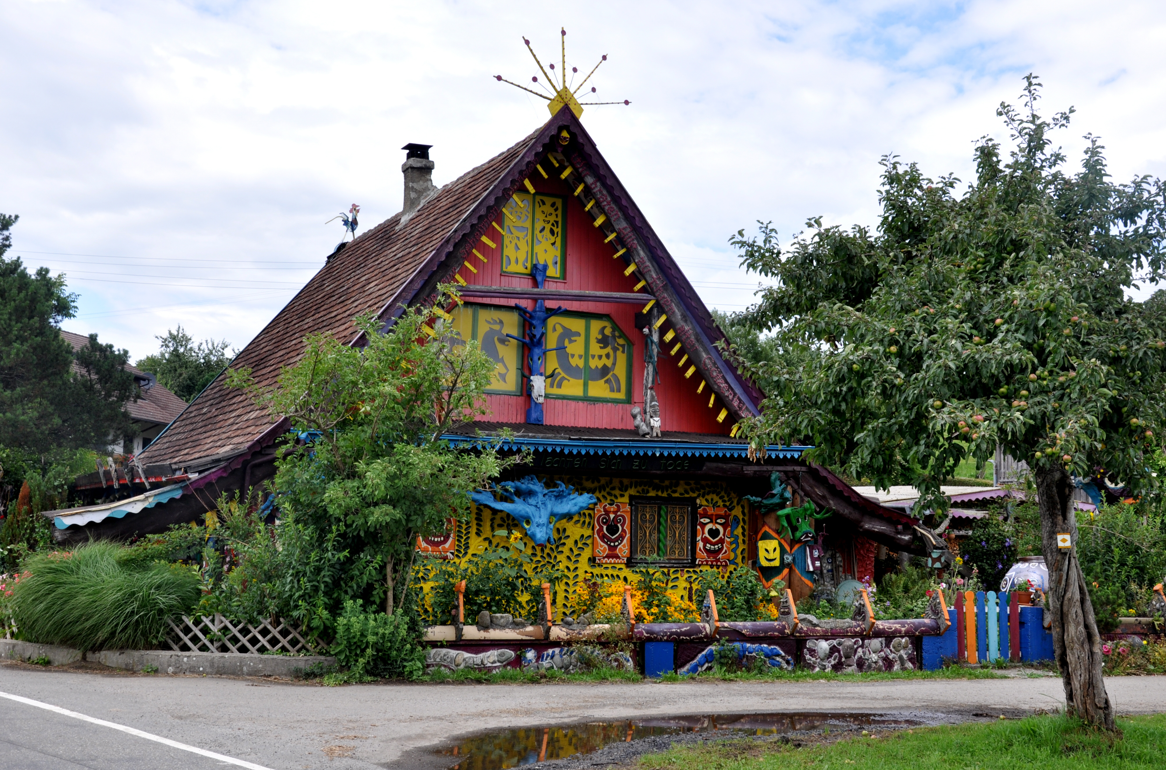 Neukirch (Bodenseekreis), Ortsteil Hinteressach, Haus des Malers Melchior Setz (so genanntes „Hexenhaus“)